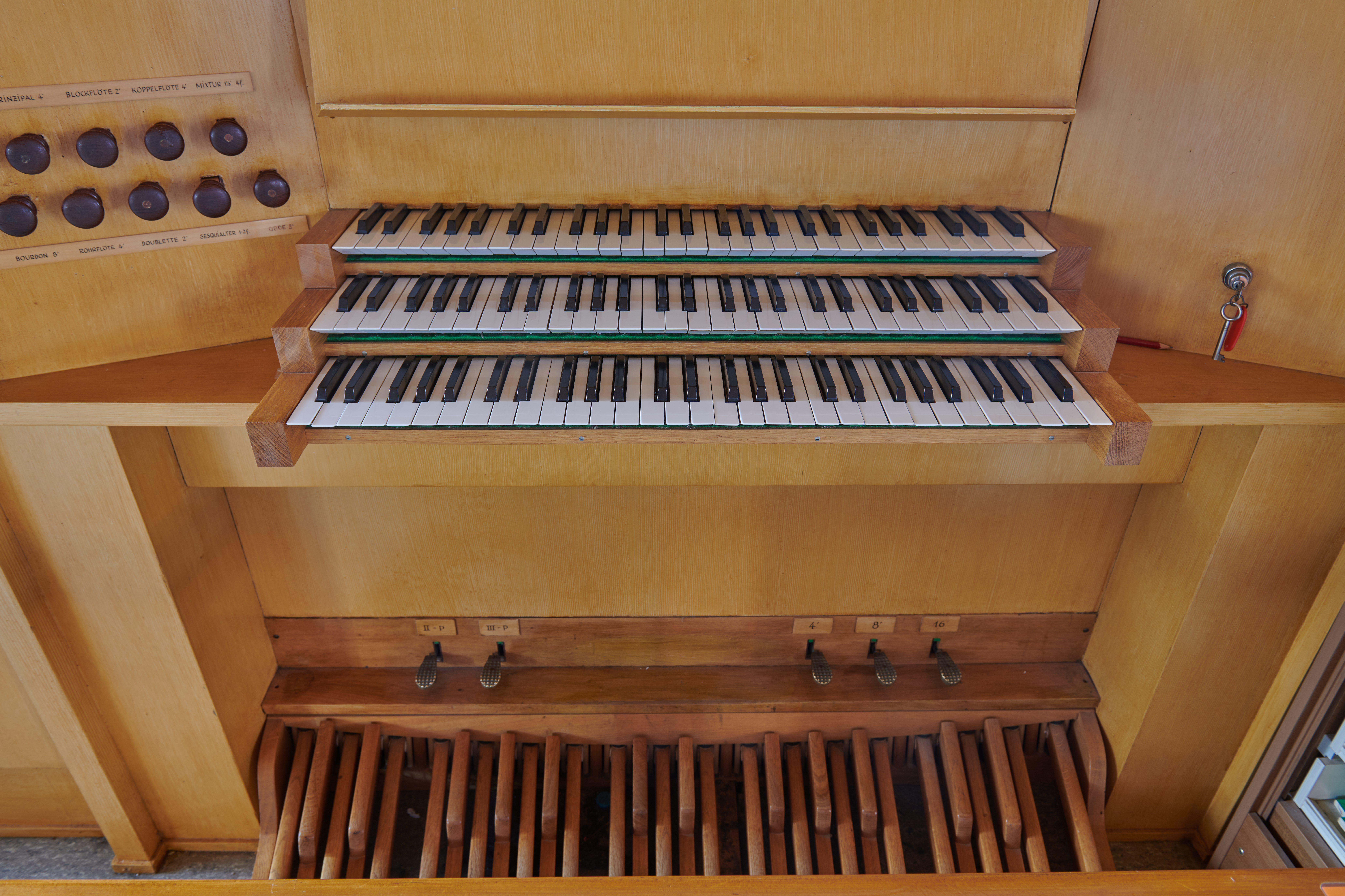 Hauinger Kirche: Orgel